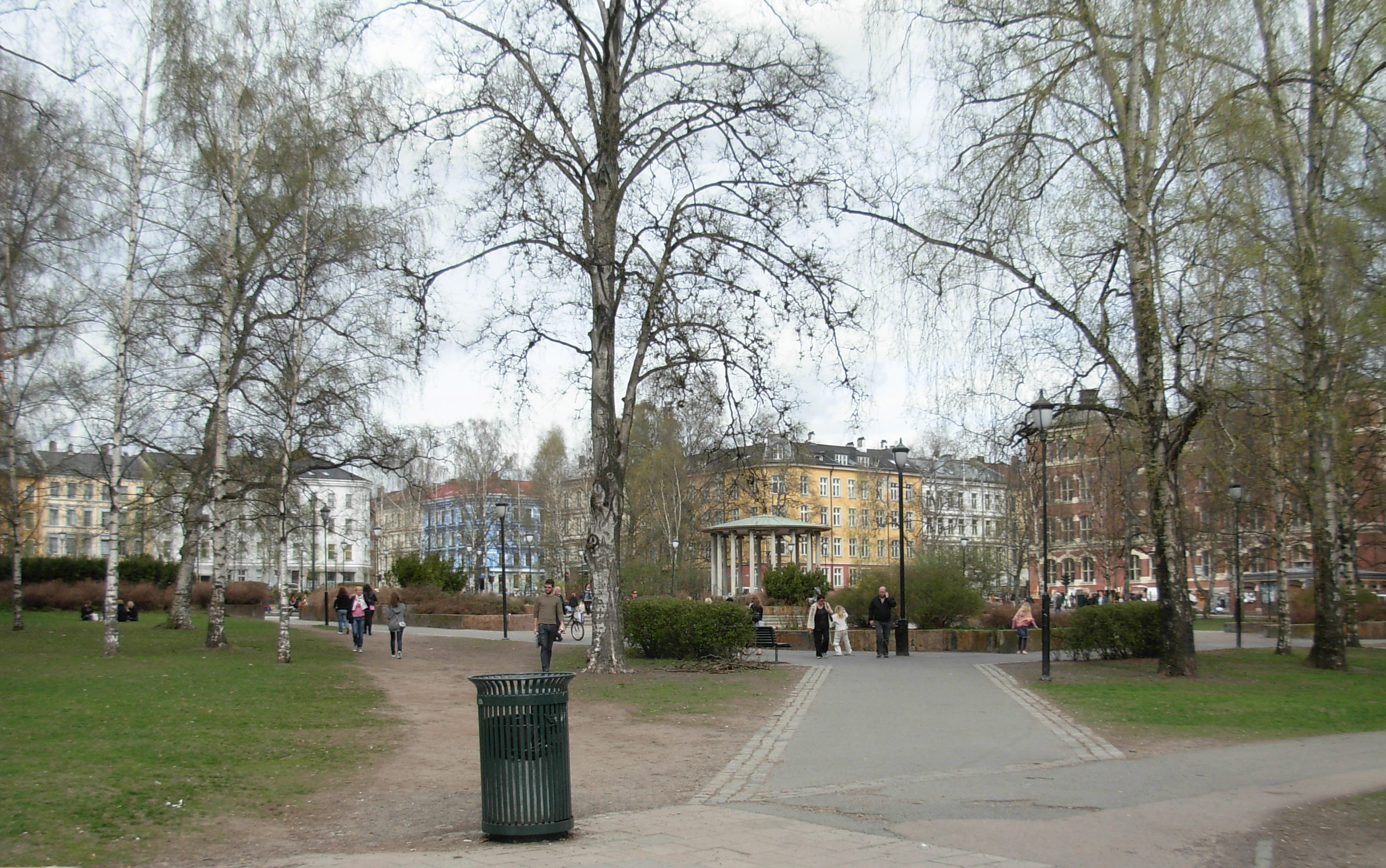 Birkelunden, seen from Th Meyers gate / Seilduksgata